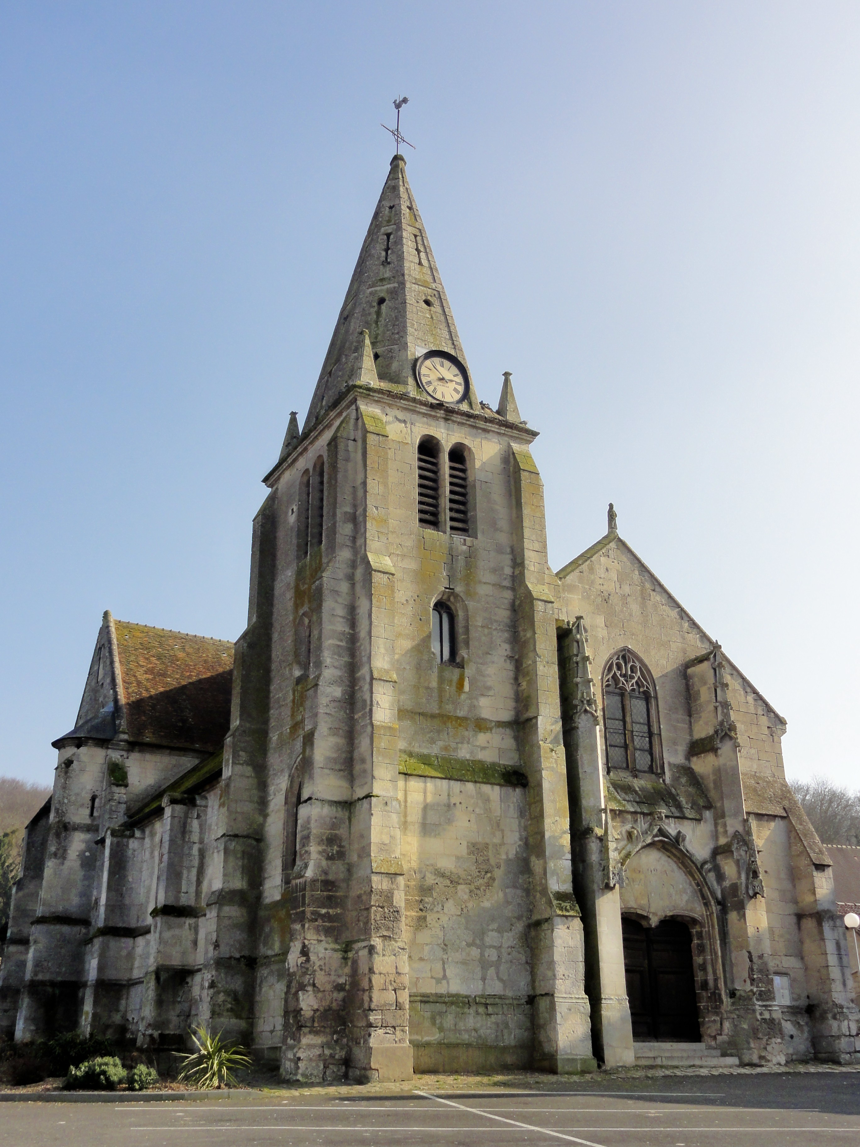 Vue depuis le nord-ouest.